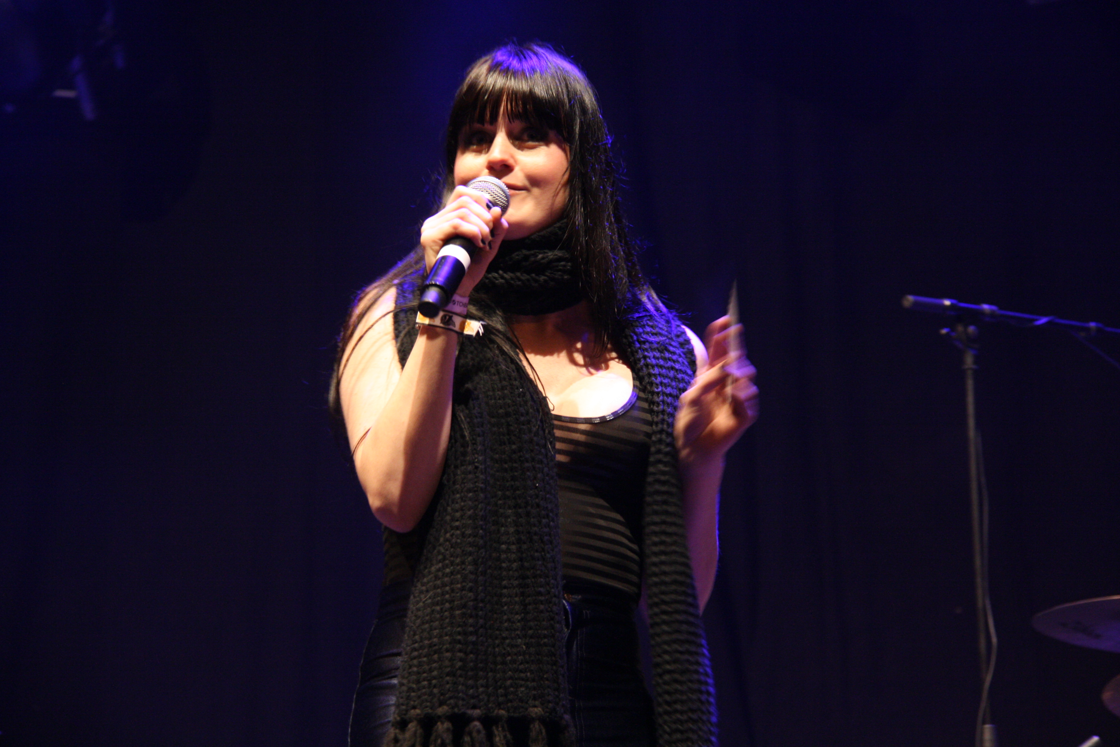 Krause presenteert Eurosonic Open Air in Groningen